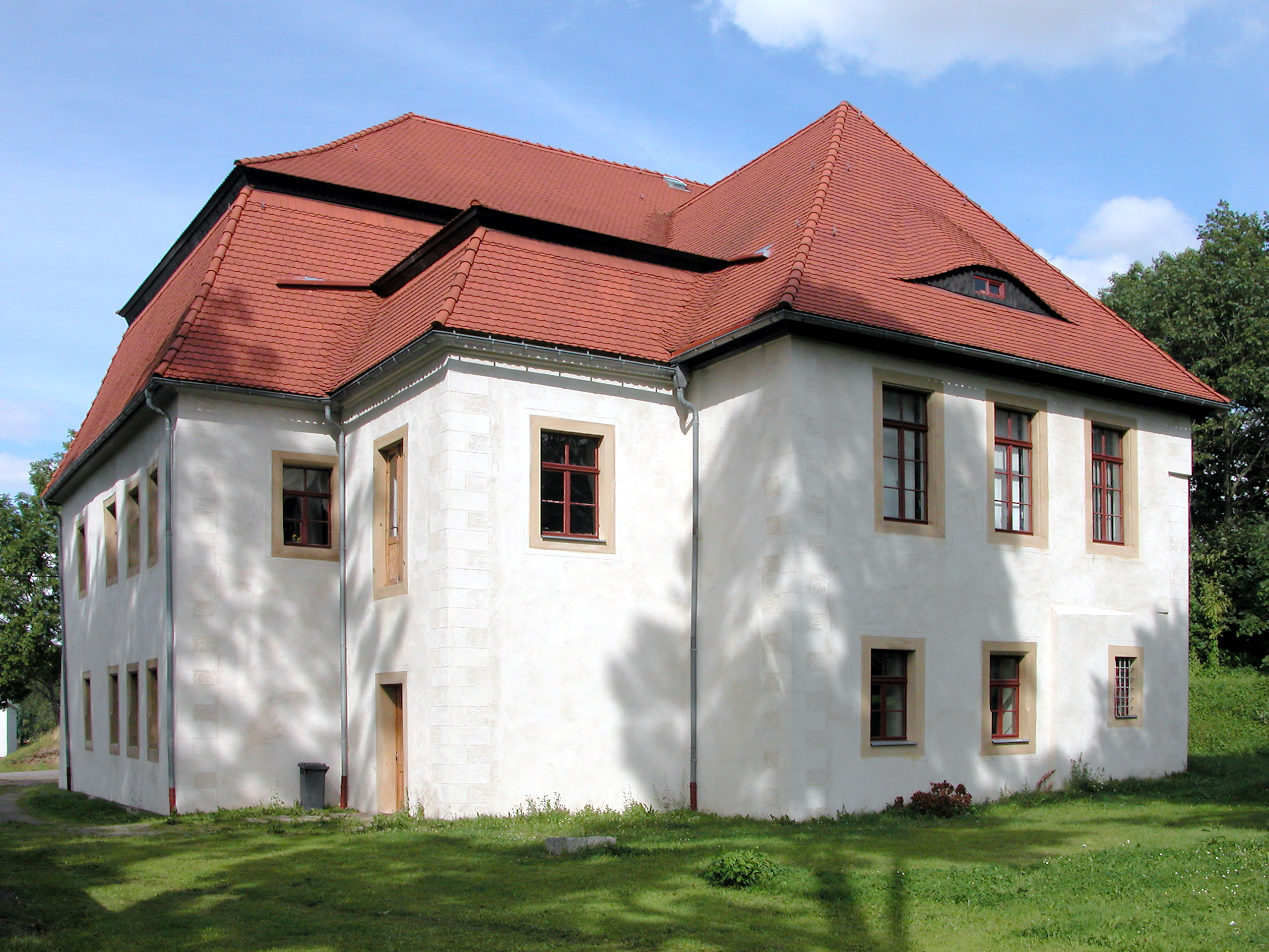 22.08.2004 09618 Großhartmannsdorf, Hofbuschweg 1 (GMP: 50.797730,13.320514): Herrenhaus, 1565 im Renaissancestil erbaut unter Sebastian Alnpeck, Freiberger Ratsherr und Rittergutsbesitzer. 1947/48 wurden alle Rittergutsgebäude mit Ausnahme des Herrenhauses abgebrochen. Von 1991-2008 wurde das baufällige Herrenhaus saniert und zum Museum und Dorfzentrum ausgebaut. [DSCN4970.TIF]20040822100DR.JPG(c)Blobelt